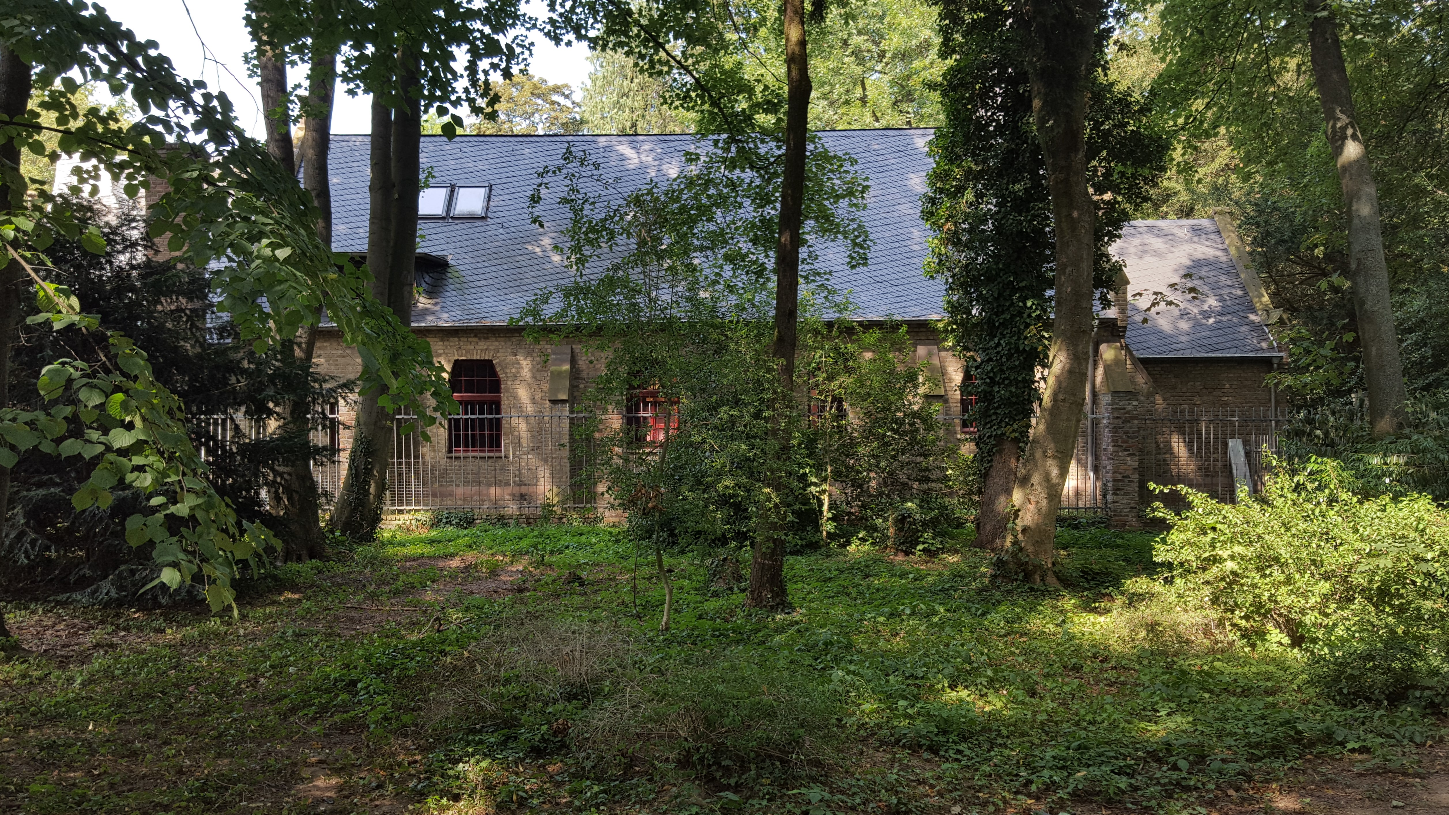 Michael-Kapelle, Am Büchel 57, Bonn-Plittersdorf (Stadtbezirk Bad Godesberg): Ansicht vom Leserpark